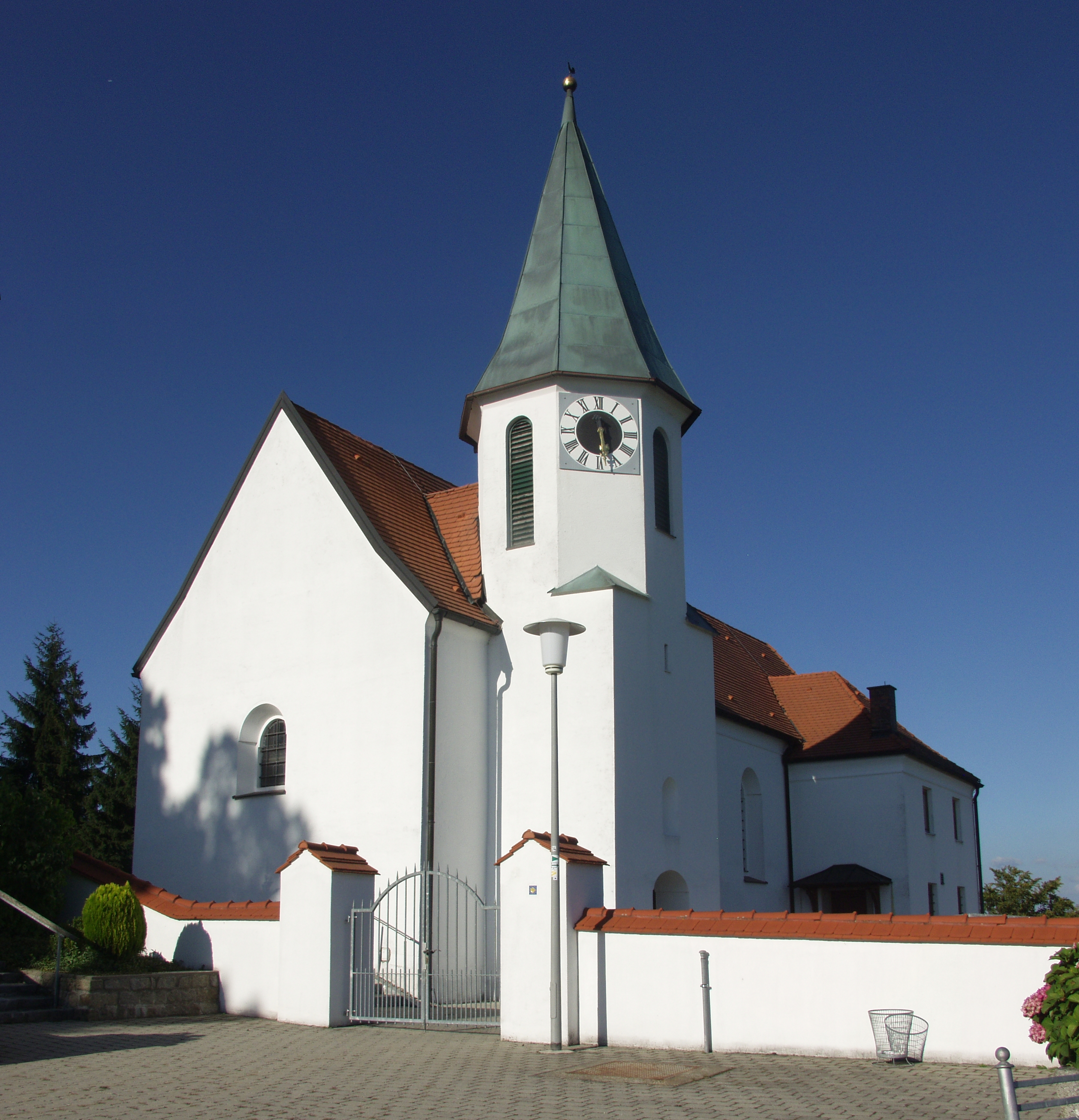 Die Wallfahrtskirche in Pilgramsberg 53″ N, 12° 36′ 45.9″ E